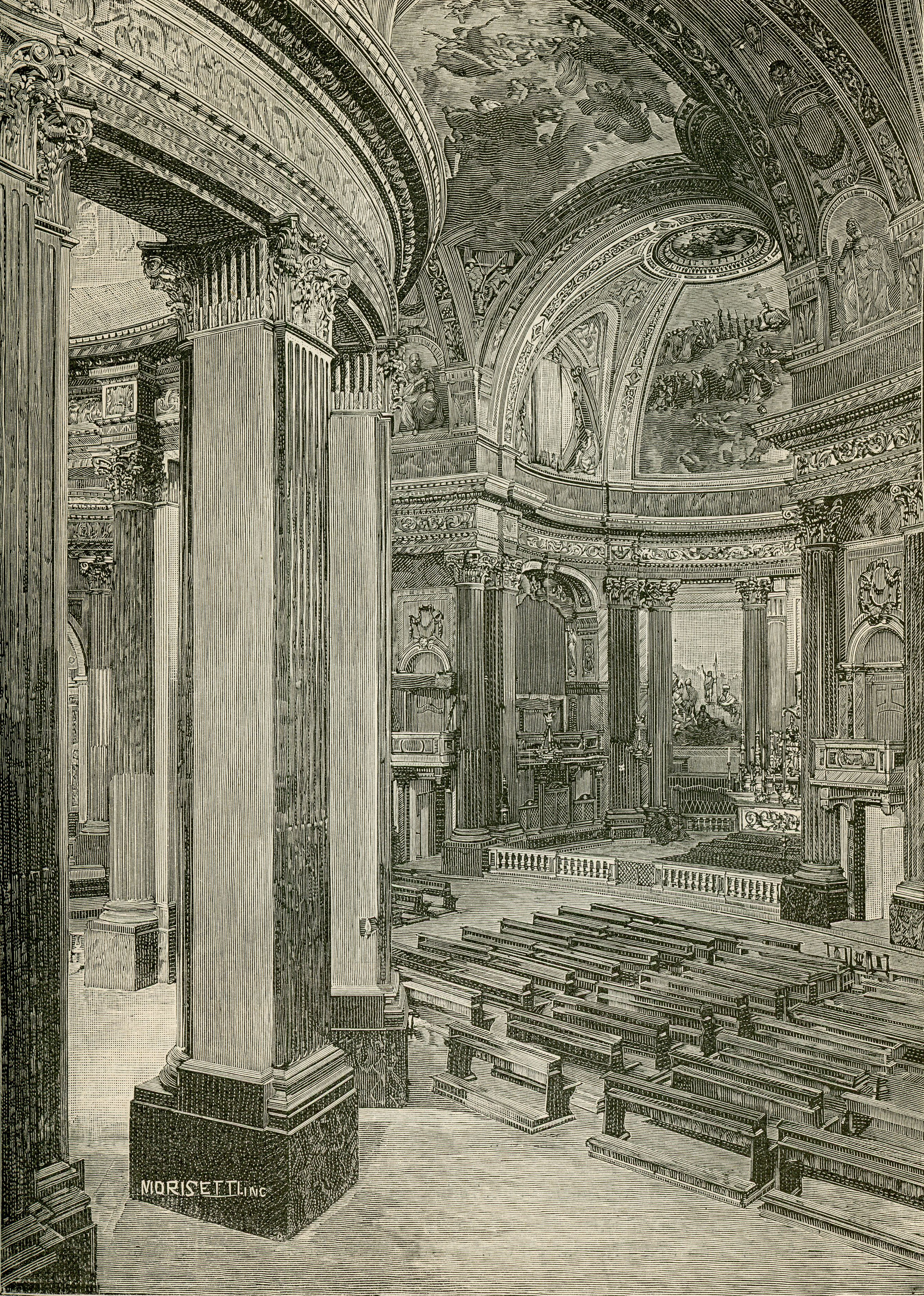 Ingresso di destra del Duomo di Carignano (xilografia).